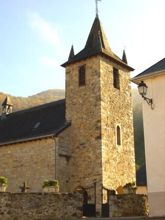 Larraineko eliza